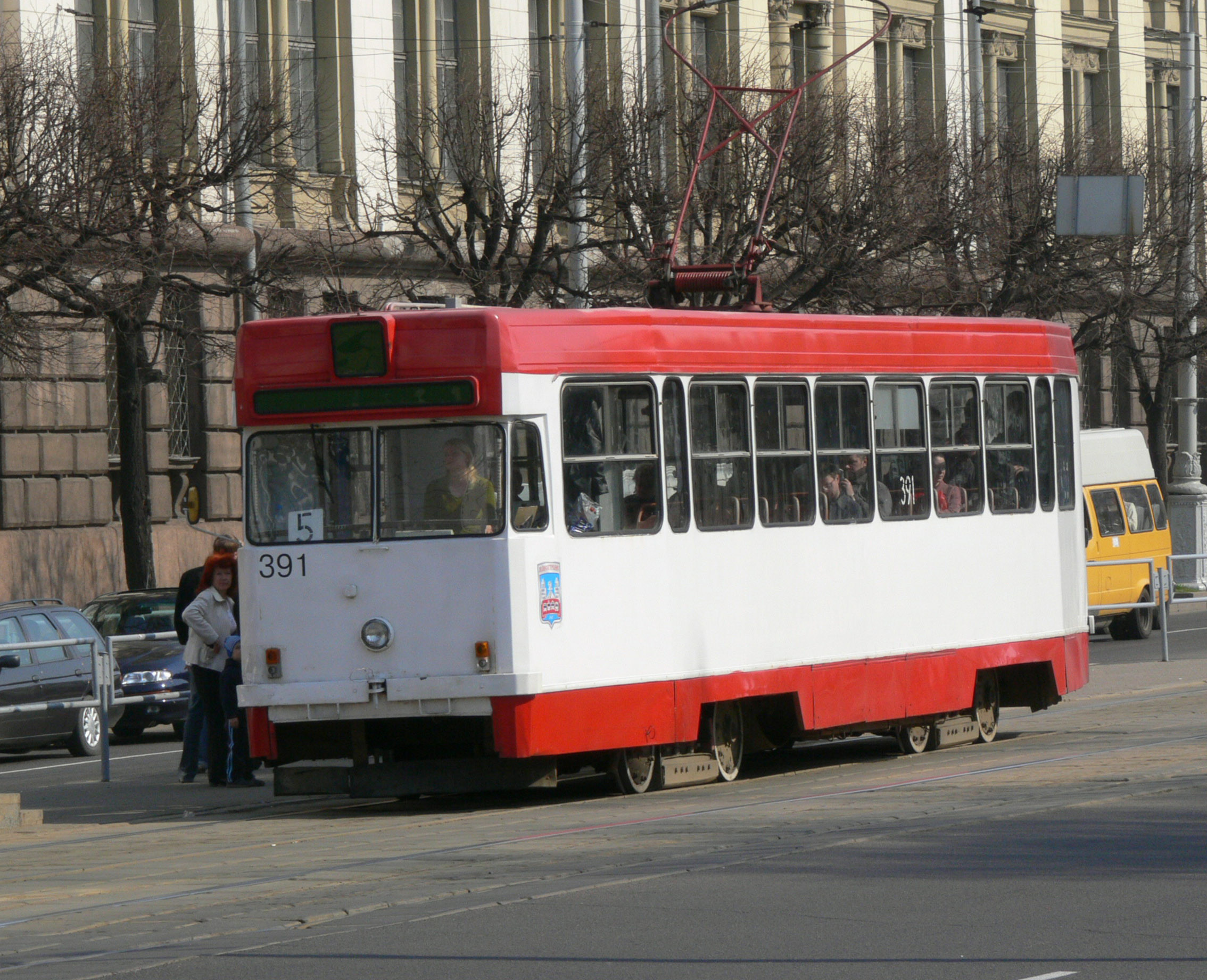 RVZ-DEMZ tram in Minsk